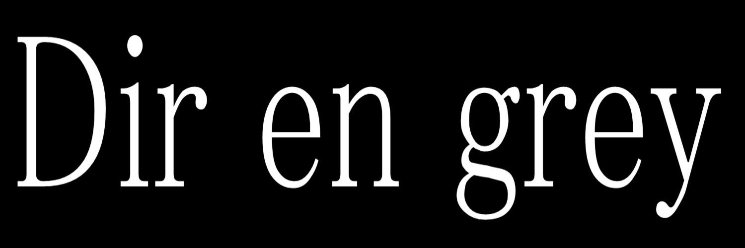 Logo de la banda japonesa Dir en grey.